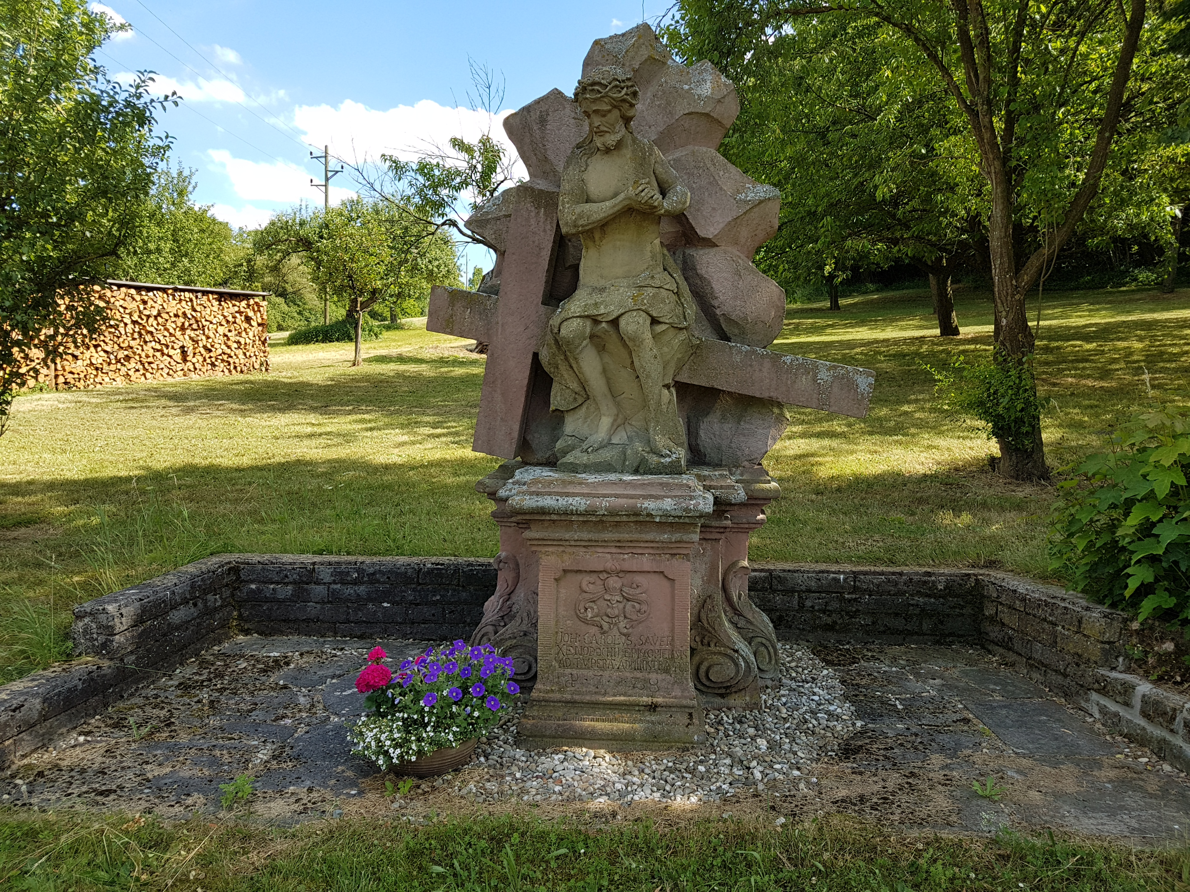 Nr. 09 der in der Dittwarer Ortschronik beschriebenen Bildstöcke und Denkmäler (siehe: Ortschronik). Johannes Carolus Sauer, ein ehemaliger Verwalter des Spitals in Tauberbischofsheim, stiftete im Jahre 1728 eine Steinfigur, die Jesus neben dem Kreuz sitzend darstellt, womit er sich besondere Gnade erhoffte. Diese wird die Ruh Christi genannt und befindet sich neben dem Kreuzweg vor Beginn des Kapellenwaldes.